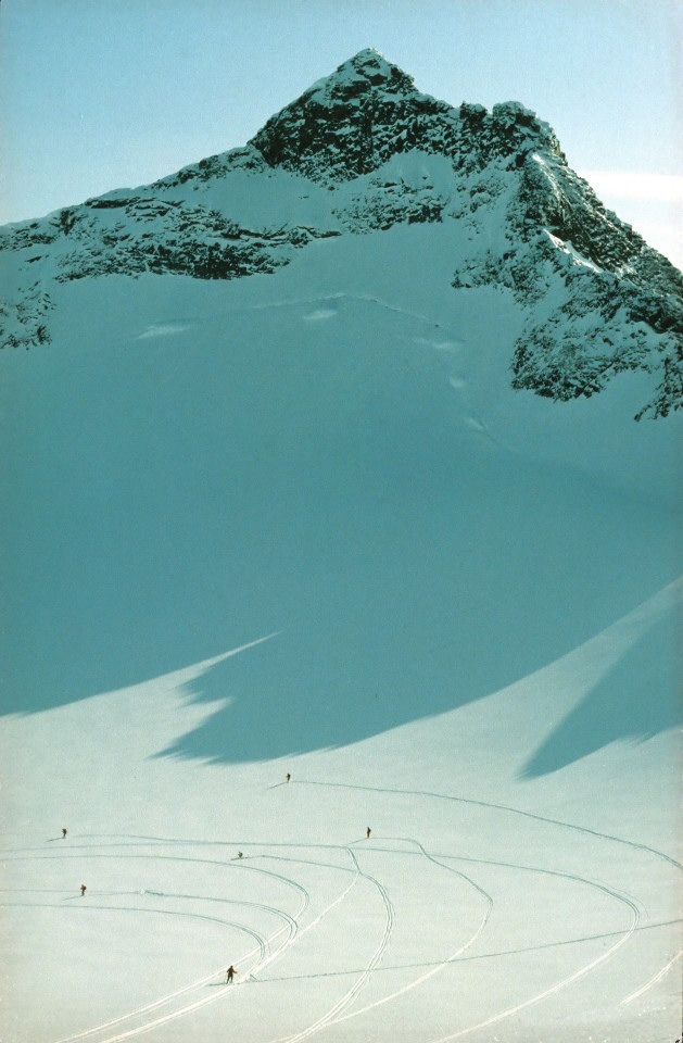 Store Hellstugutinden sett fra Midtre Hellstugutinden. Foto: Tore Røraas.